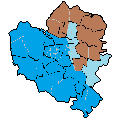 Zugehörigkeit der Wolfsburger Stadtteile zum Land Braunschweig (braun, bis 1946) und zu Preußen (dunkelblau Provinz Hannover; hellblau bis 1932 Provinz Sachsen, danach ebenfalls Provinz Hannover)